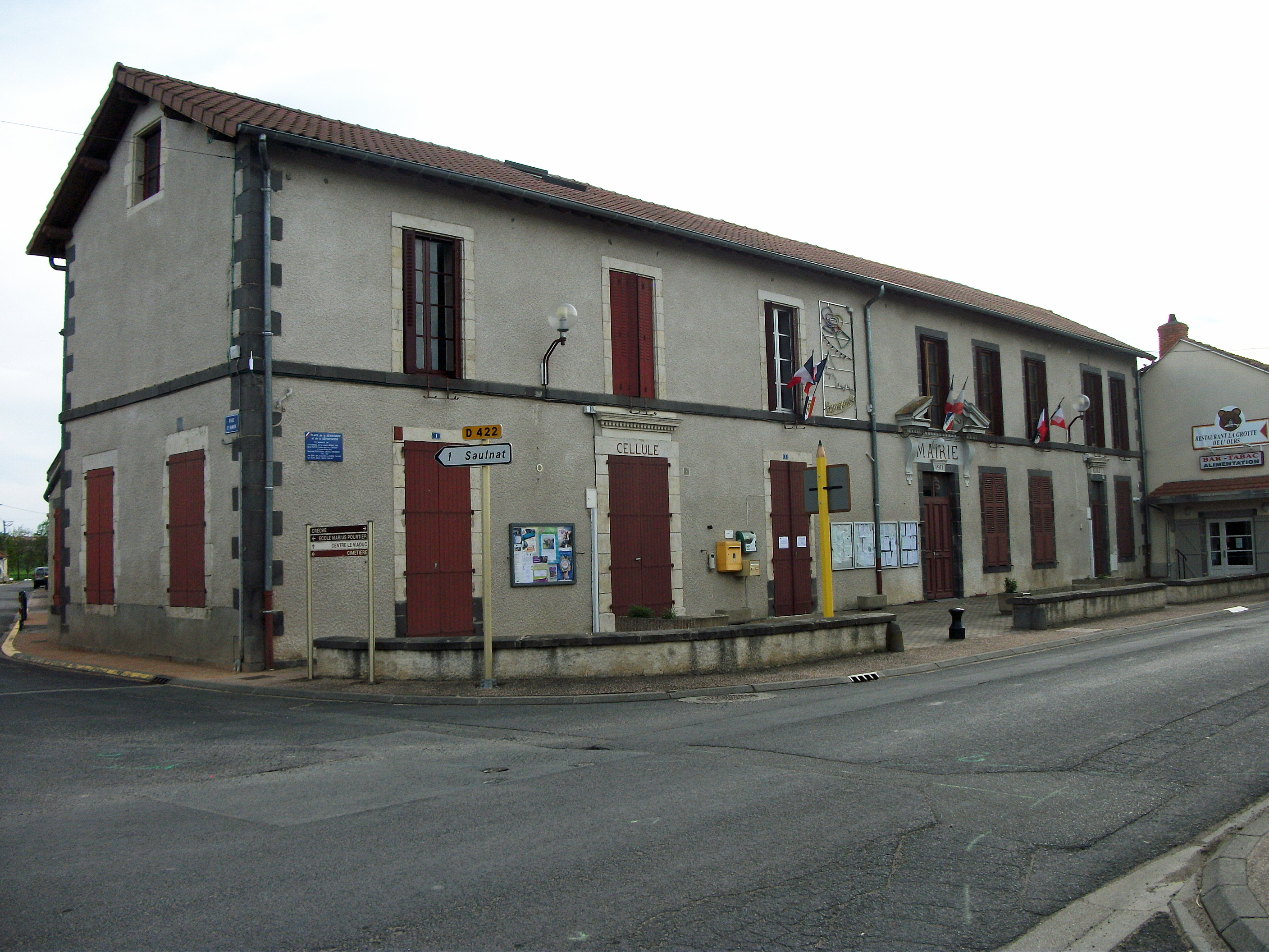 Town hall of former commune of Cellule, Puy-de-Dôme / Mairie de l'ancienne commune de Cellule (Puy-de-Dôme) [10807]